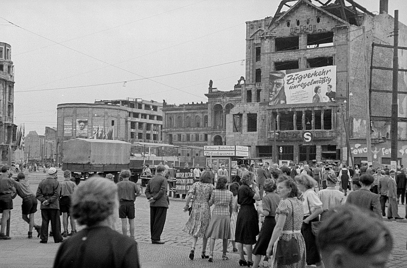 Original image description from the Deutsche FotothekBegegnungen von Weltfestpielteilnehmern am Potsdamer Platz